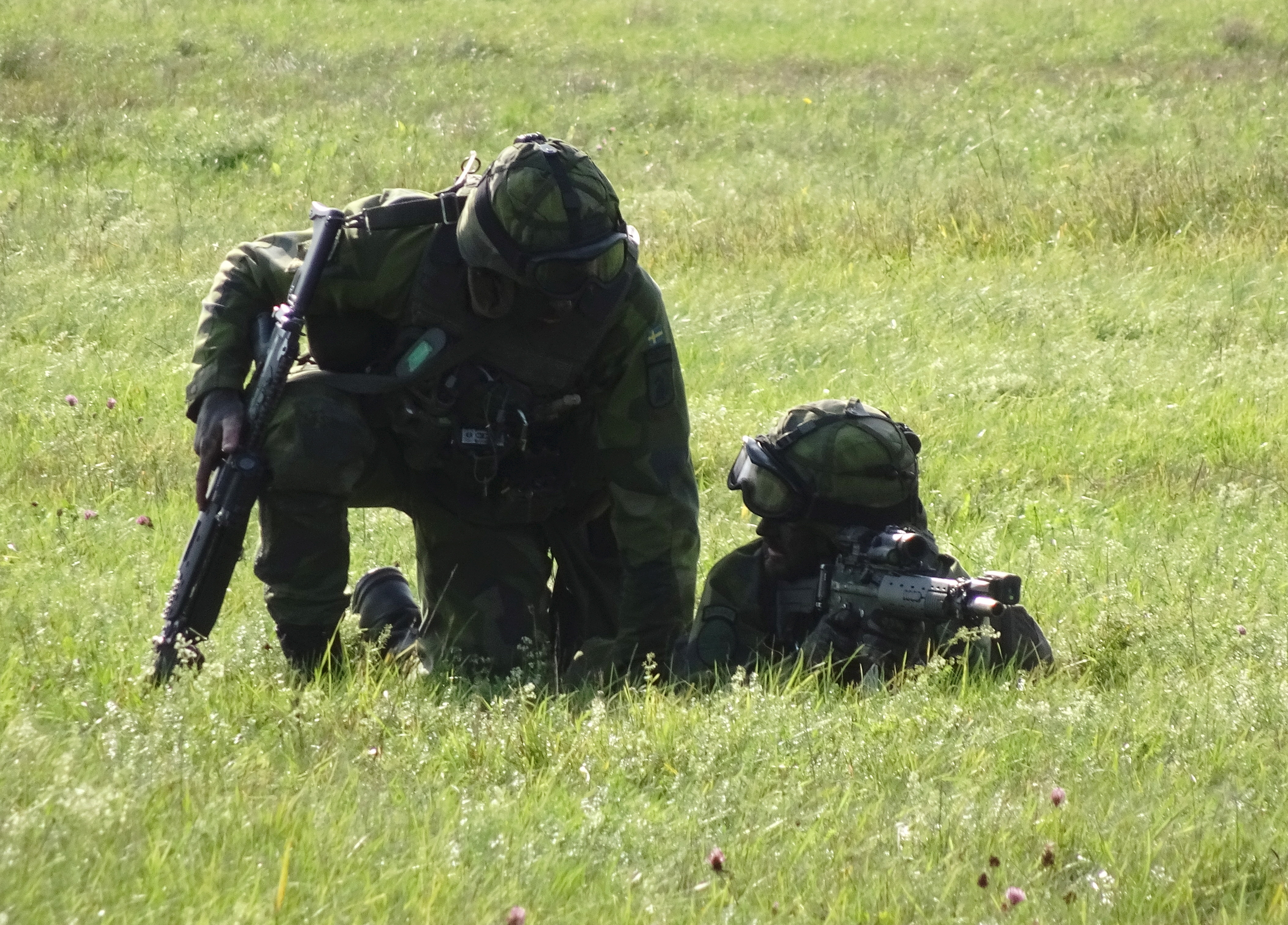 Aurora 17, Uppvisning och övning på Gärdet